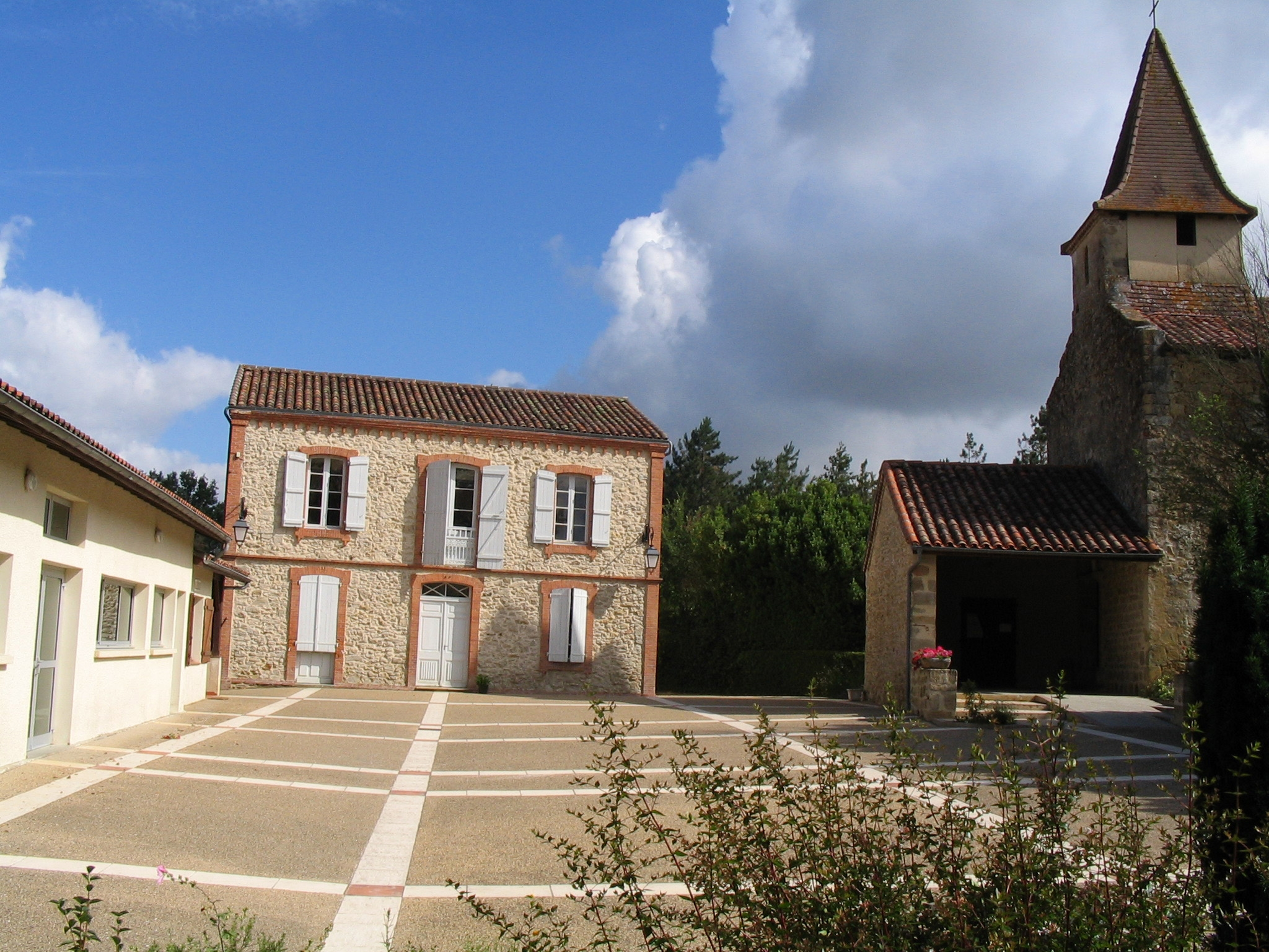 Mairie et église de Fustérouau